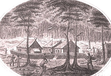 Fort du Bois